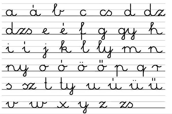 Magyar abc írott kisbetűvel